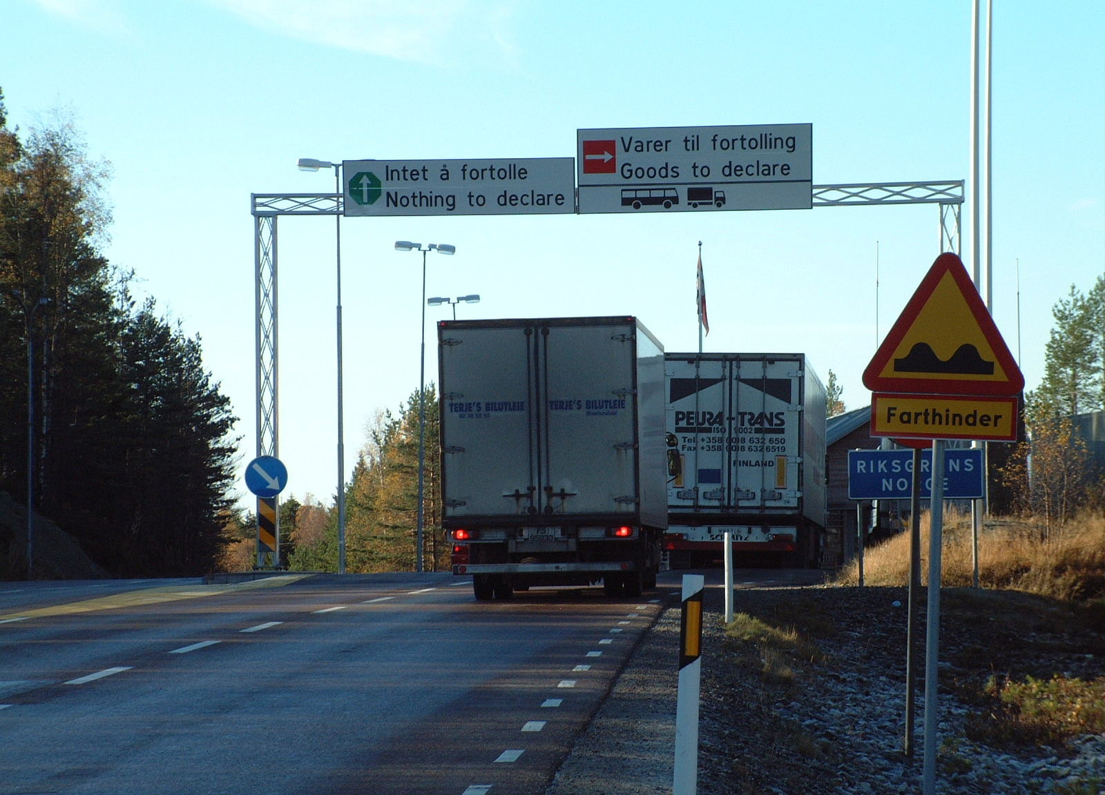 进入挪威边境检查区RIKSGRENS NORGE